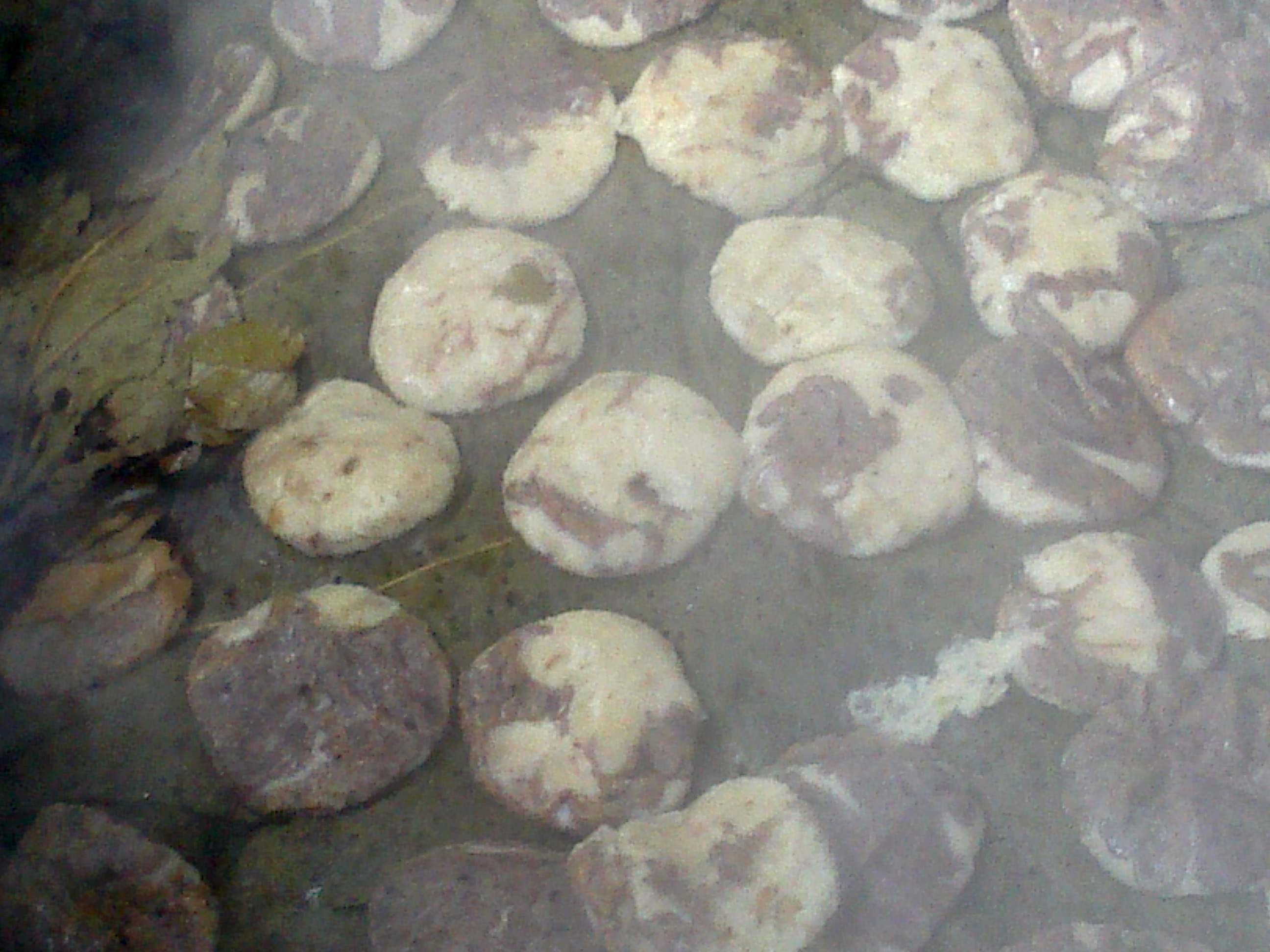 Chapales cocidos en un curanto en Dalcahue, Chiloé, Chile.